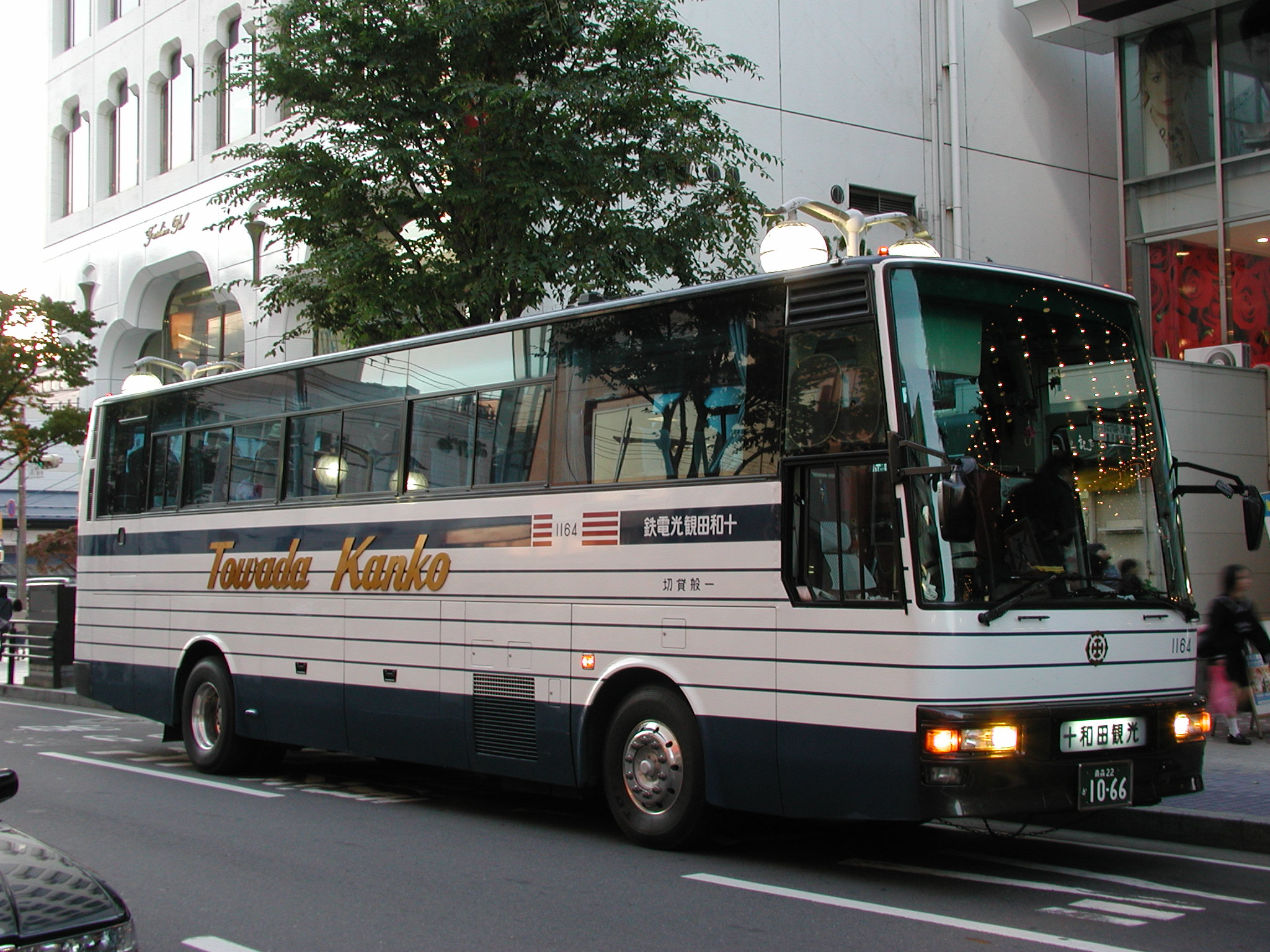 十和田観光電鉄バス 観光貸切塗装（いすゞ・スーパークルーザー：U-LV771R）：青森ナンバー 八戸市十三日町付近にて